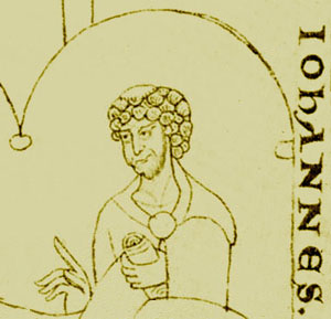 Darstellung des Johannes Scottus Eriugena in einer Handschrift der Clavis physicae des Honorius Augustodunensis, Paris, Bibliothèque Nationale, Lat. 6734 fol. 3r (12. Jh.)